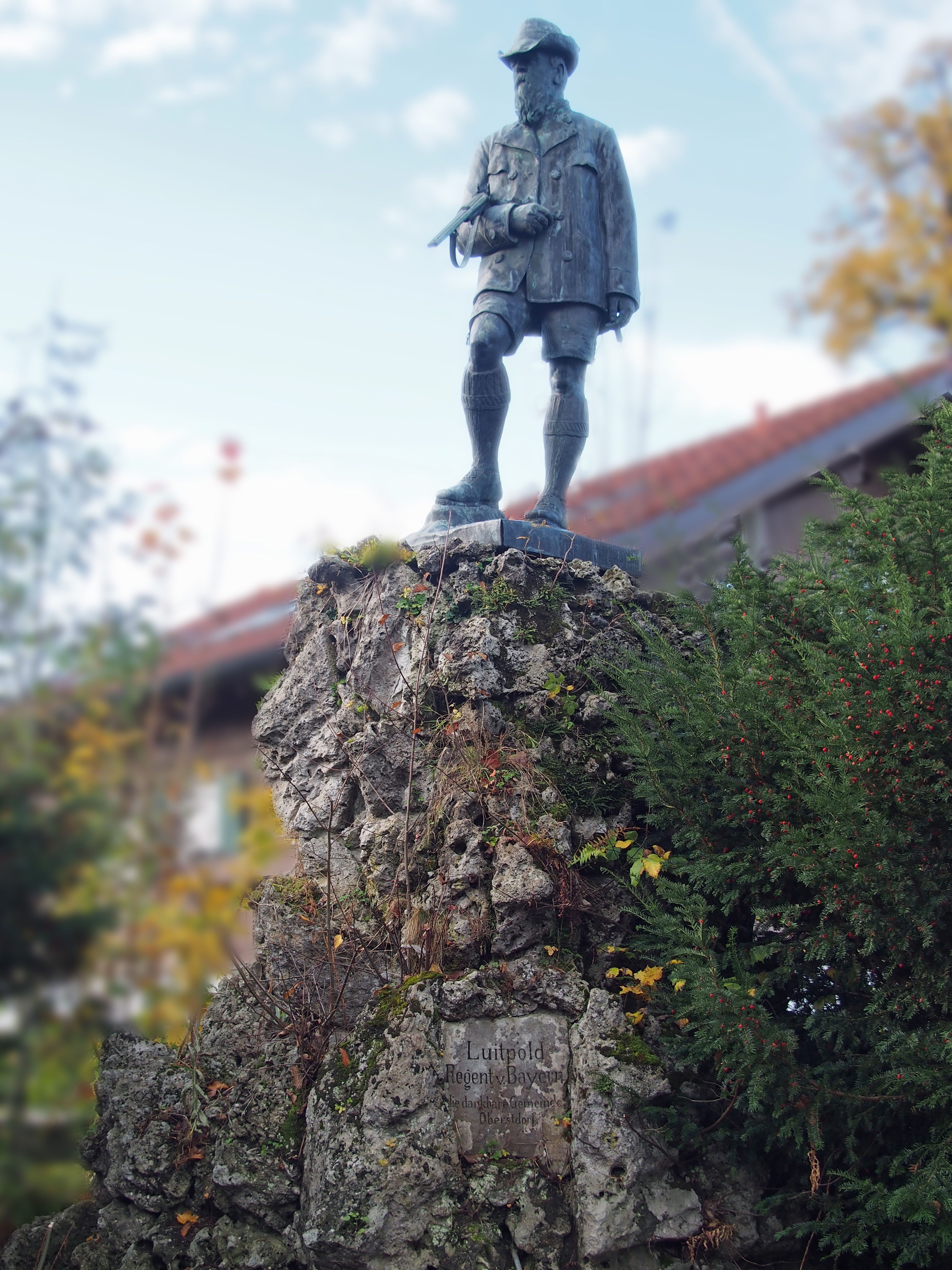 Prinzregenten-Denkmal von 1912 in Oberstdorf von Bildhauer Xaver Abt, es zeigt Prinzregent Luitpold nach einem Gemälde von Franz Defregger.